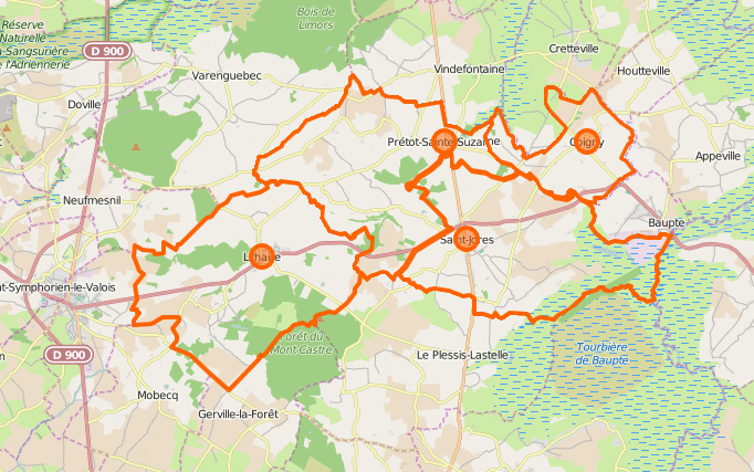 les quatres communes fusionnées